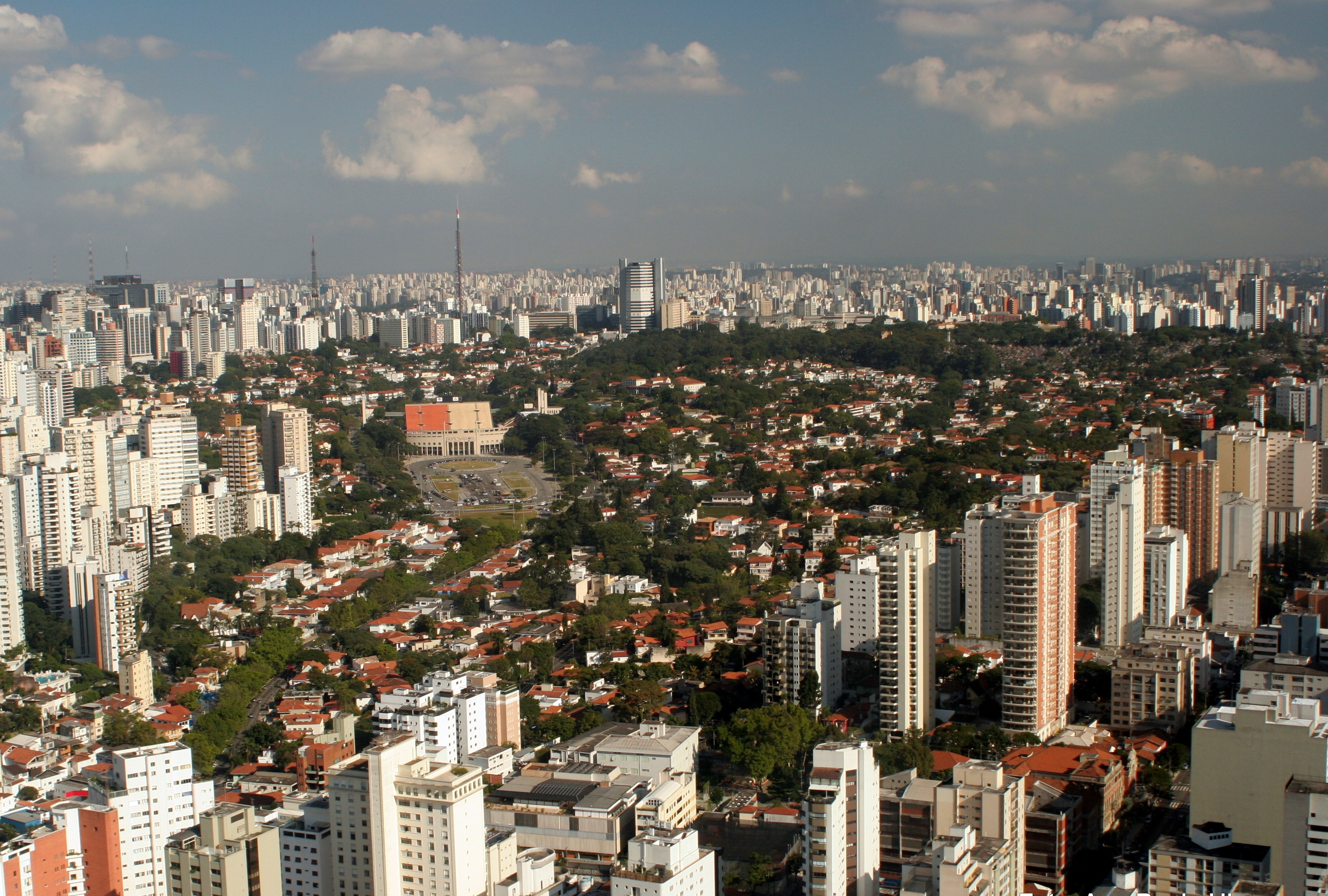 Vista do bairro Pacaembu, em São Paulo, Brasil.